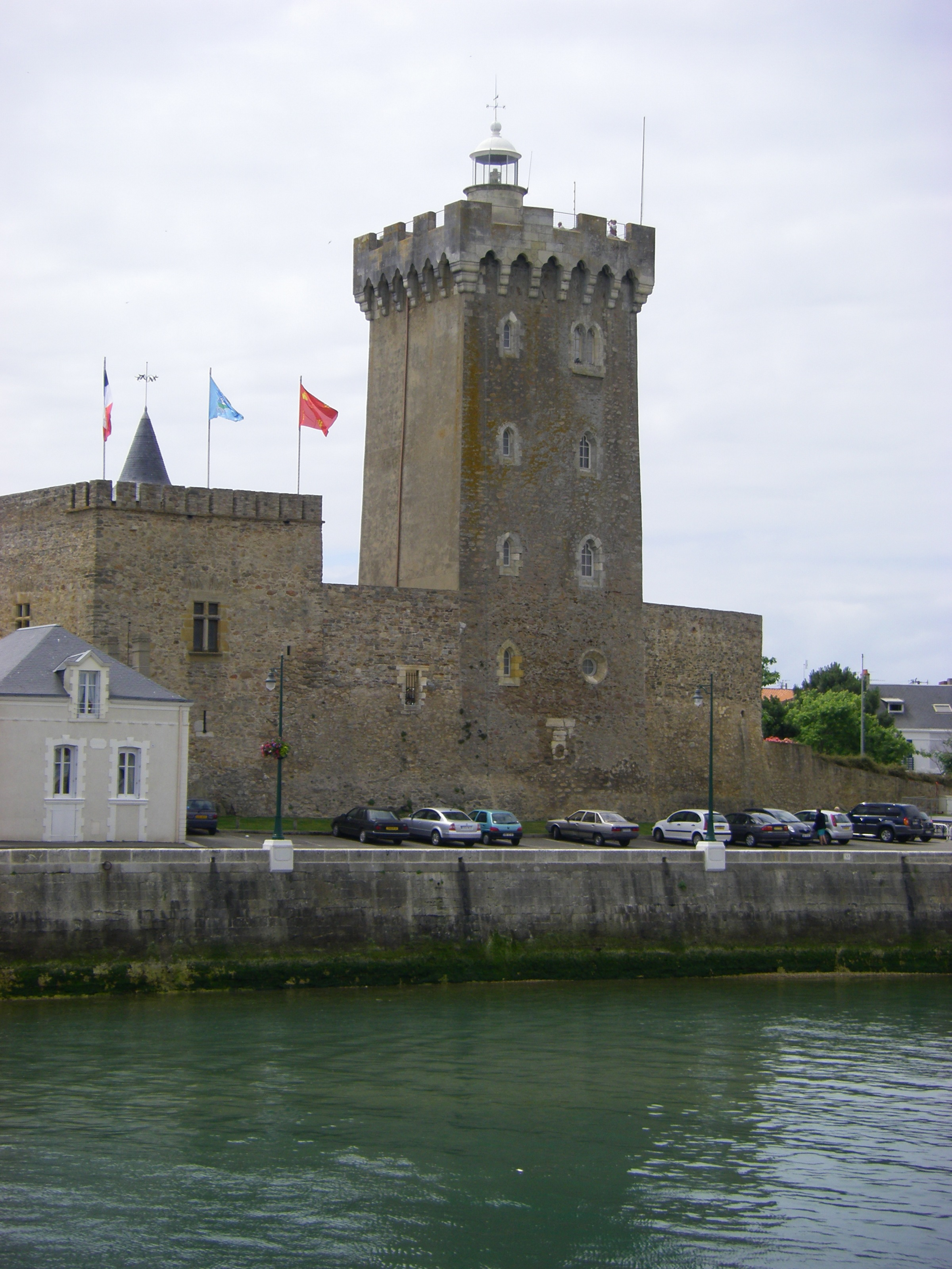 Der Tour d'Arundel in Les Sables d'Olonne. Der Burgfried des Château Saint-Clair dient heute als Leuchtturm.